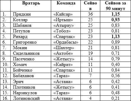 статистика среди вратарей КПЛ 2014.